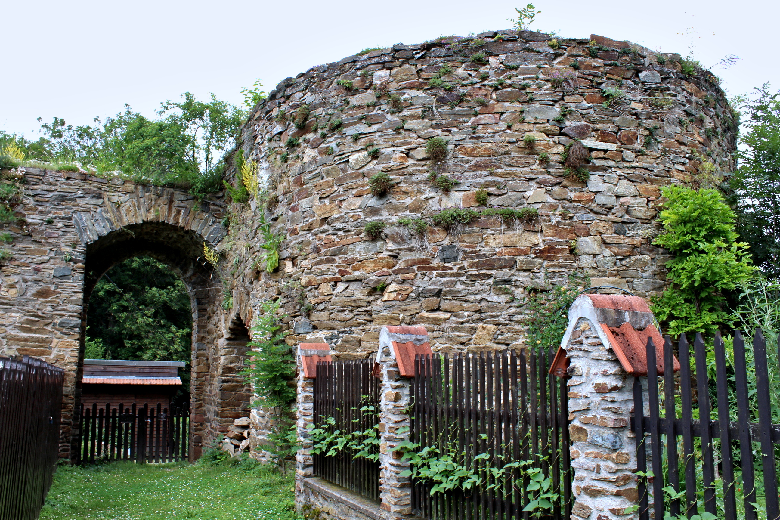 Zřícenina hradu Talmberk